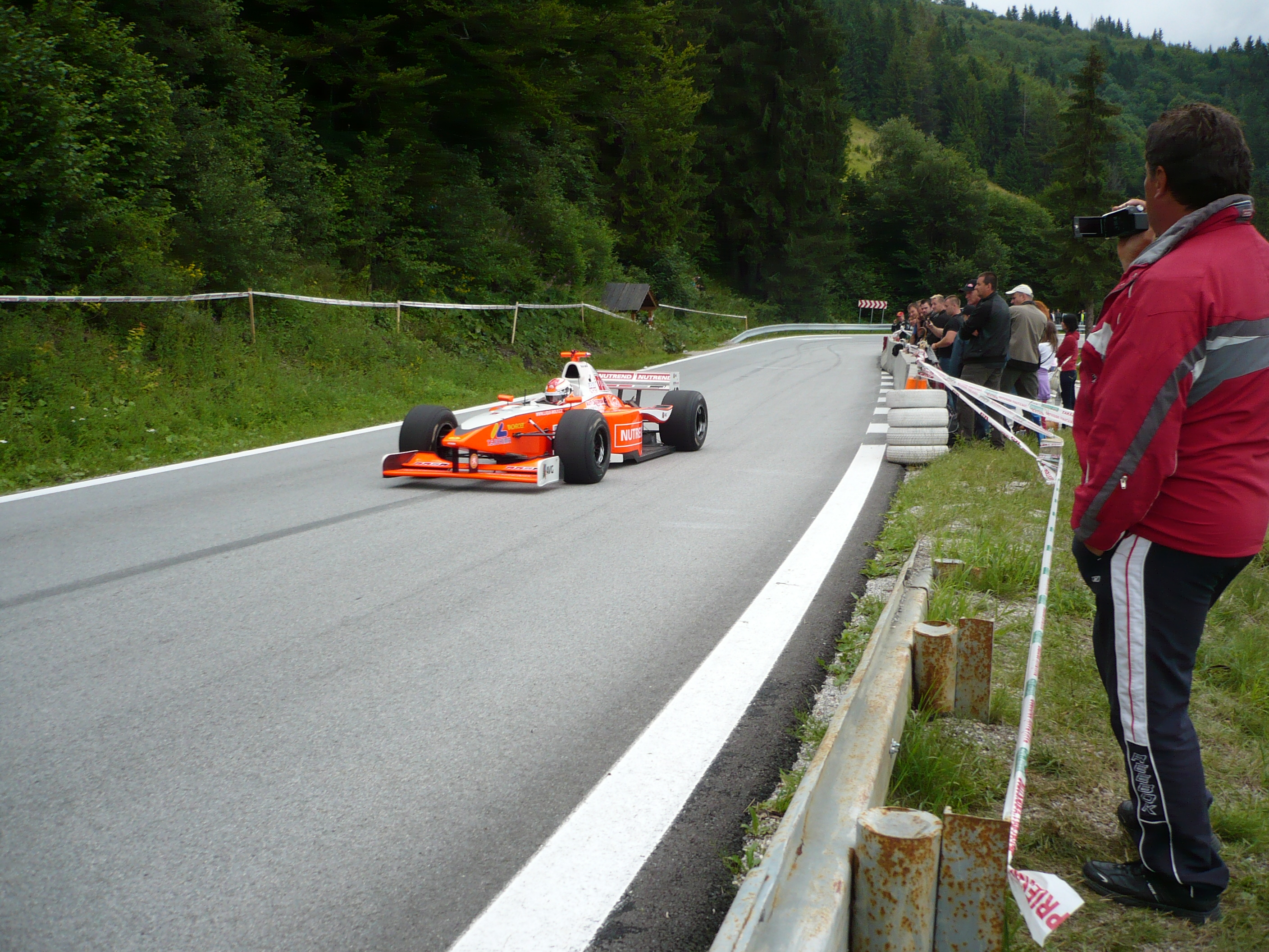 Lola B02/50 Václava Janíka na ME PAV Dobšinský kopec 2012